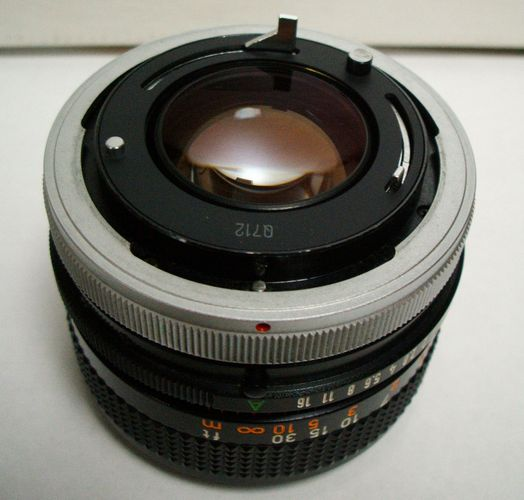 キヤノンFDレンズマウント側の機構